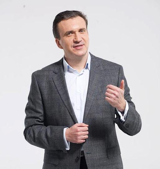 Павло Шеремета, Президент KSE